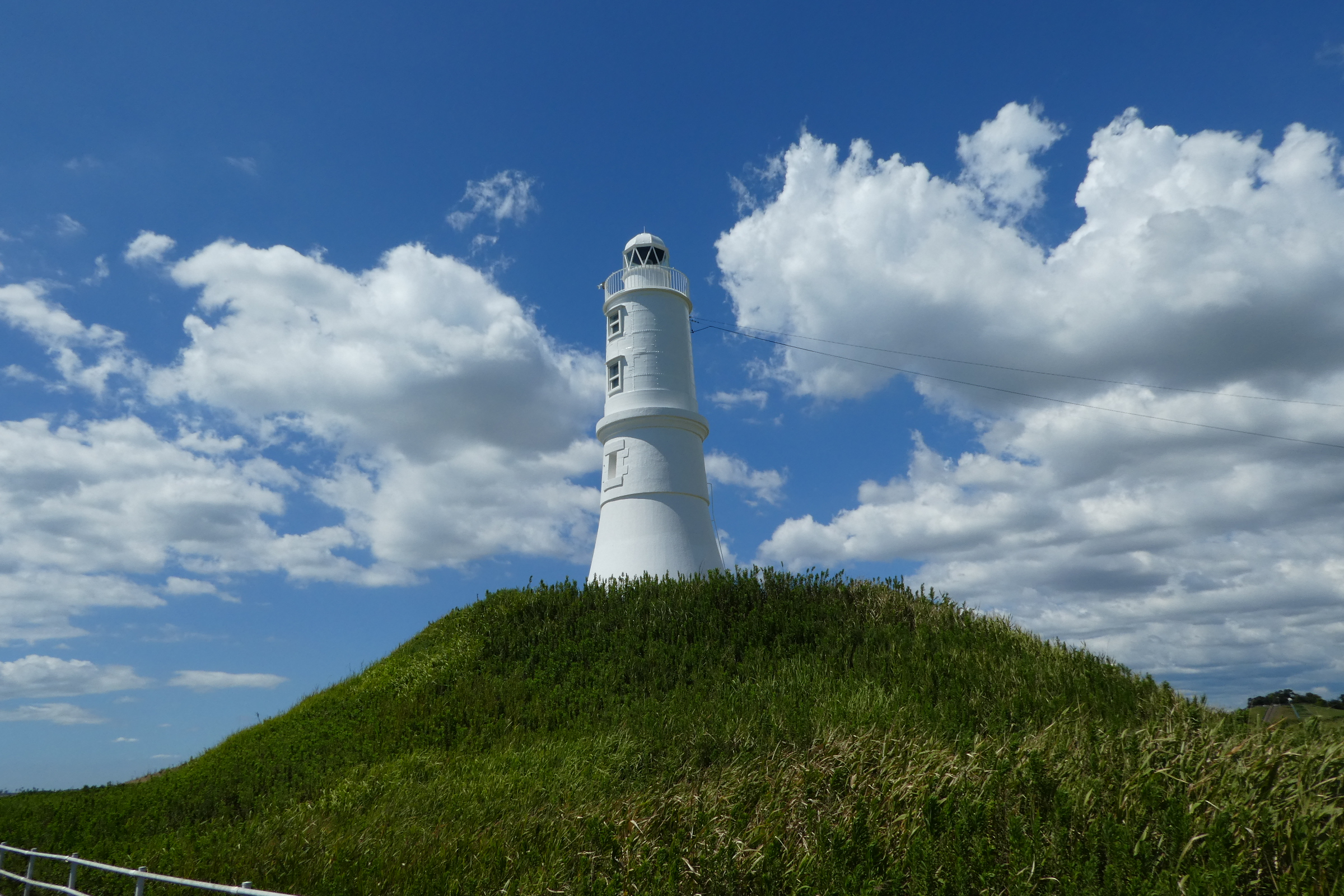 掛塚灯台。静岡県磐田市天竜川河口右岸。